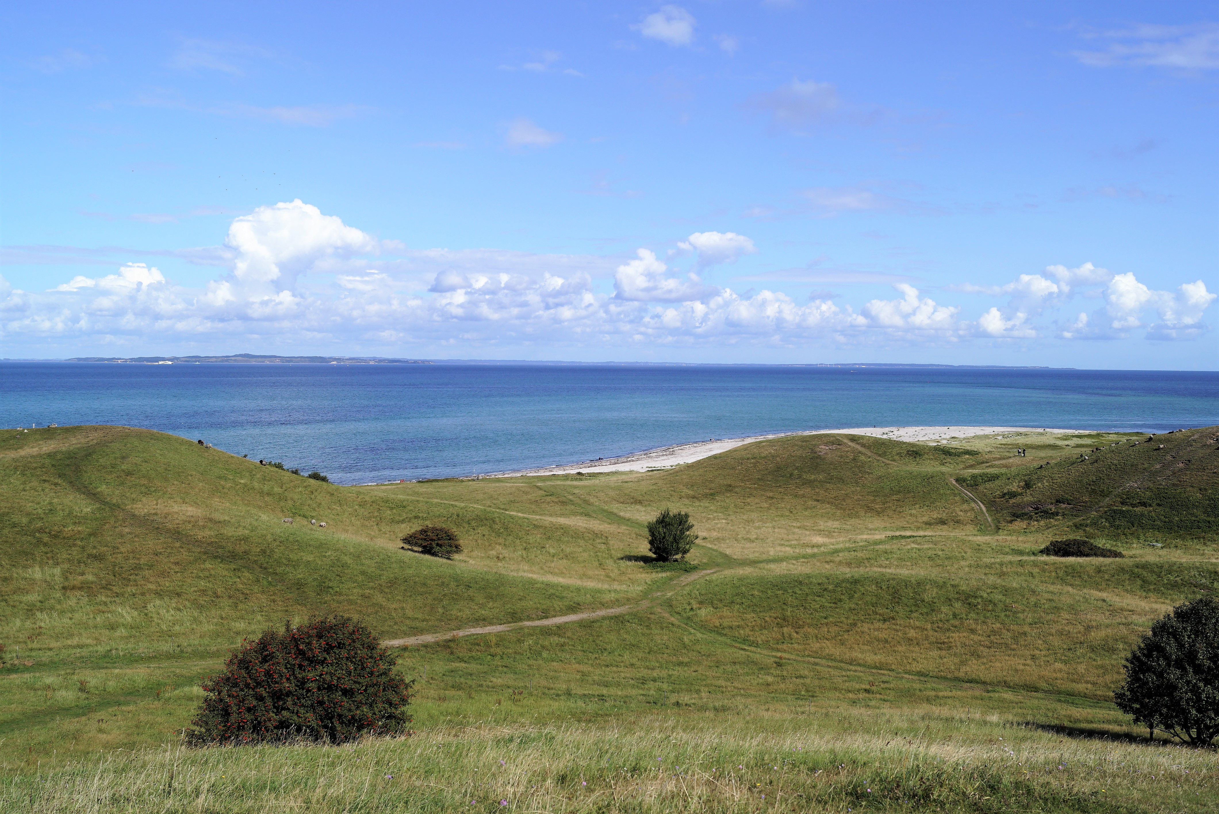 Issehoved med Sletterhage i baggrunden